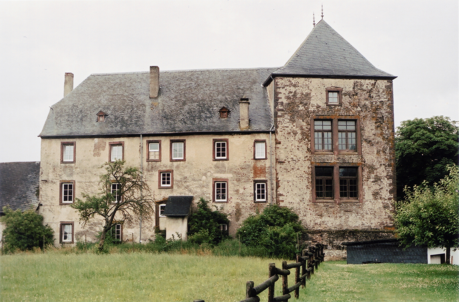 Nordwestansicht der Burg Dudeldorf